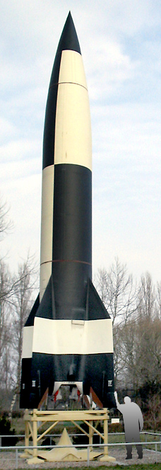 Beschreibung: Nachbau mit Originalteilen einer V2(A4), Maßstab 1:1, ausgestellt im Historisch-technischen Informationszentrum Peenemünde Person wurde von mir nachträglich verfremdet Vorstellung der Größe der V2 nun besser möglich Fotograf: Darkone, 27. Februar 2004